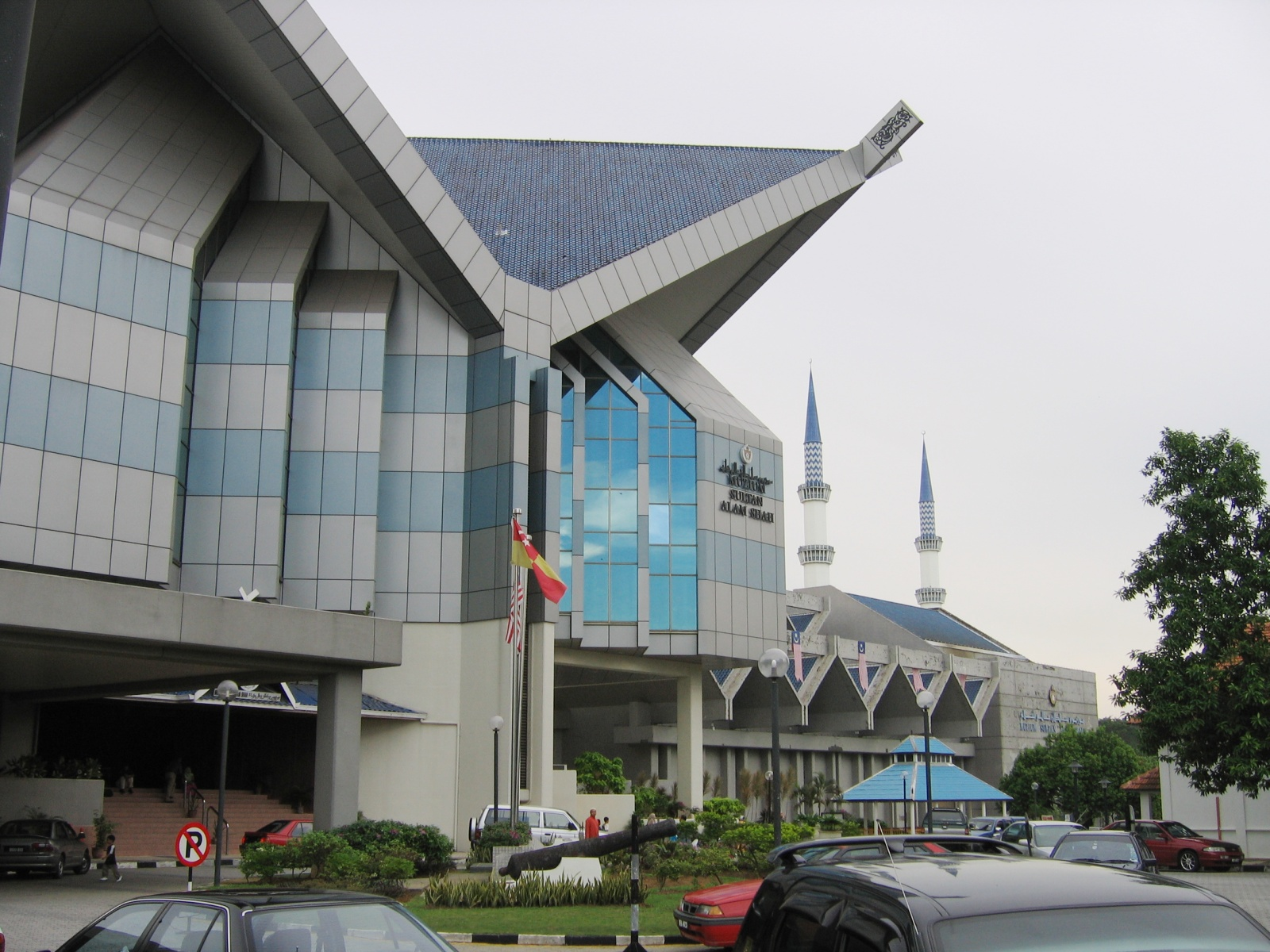 Sultan Alam Shah Museum in Shah Alam, Selangor, Malaysia.